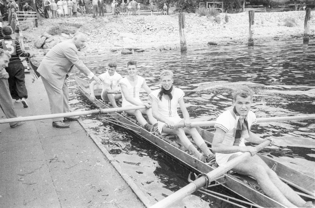 Jungruderer-Vierer mit Steuermann des Ersten Kieler Ruder-Clubs (EKRC) am Bootssteg der Seeburg-Brücke. Im Bild u.a. Wolfgang Raddatz (1.v.r.), Peter Paustian (2.v.r), Christian Prey (3.v.r.), Karl-Heinz Schmidt (4.v.r.) und der 1. Vorsitzende des Schleswig-Holsteinischen Regattavereins Kurt Neumann (5.v.r.).